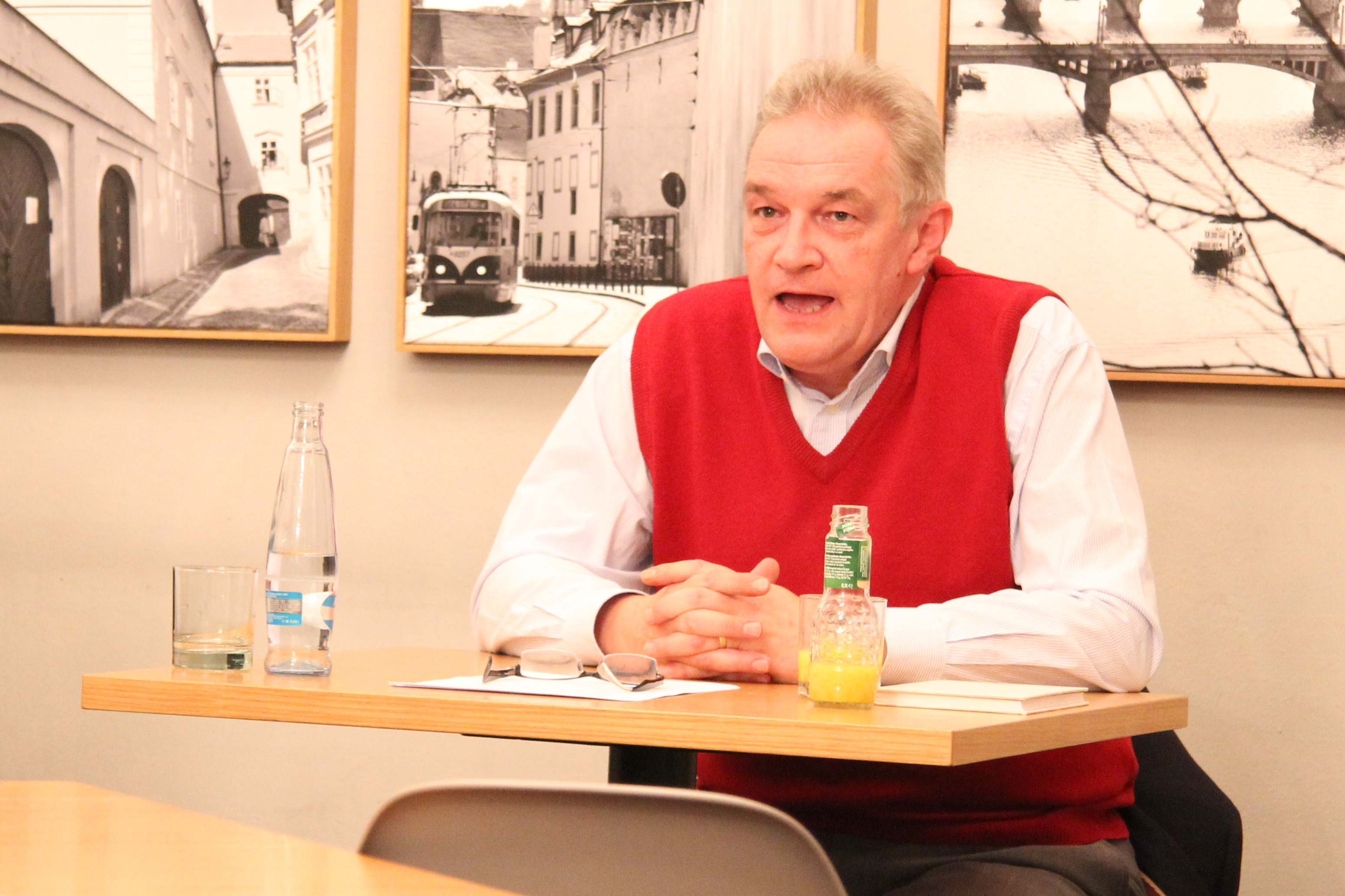 prof. JUDr. Michal Skřejpek, DrSc.